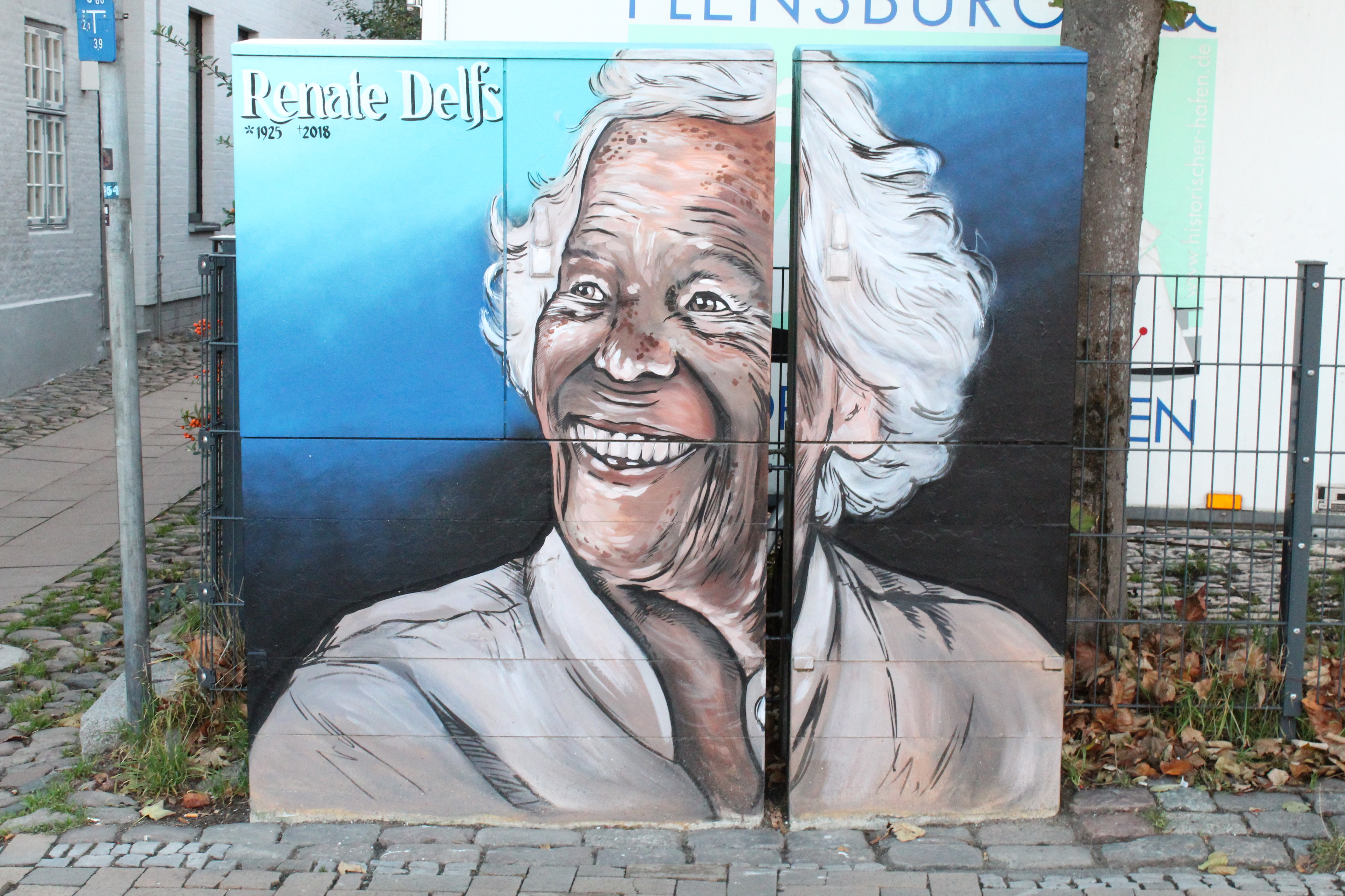 Stromkasten mit Renate Delfs-Motiv (2018), an der Schiffbrücke, am Anfang vom Herrenstall in Flensburg